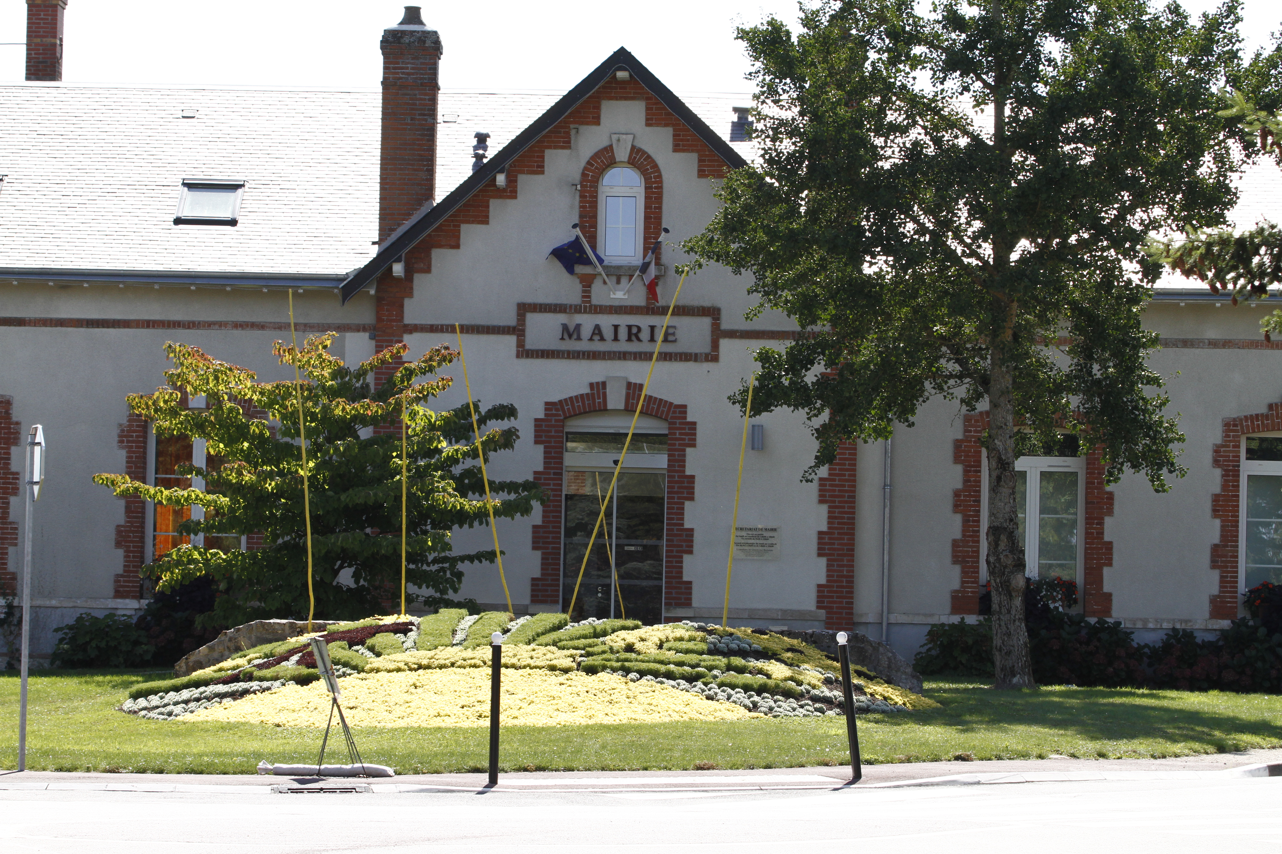 L'entrée de la mairie